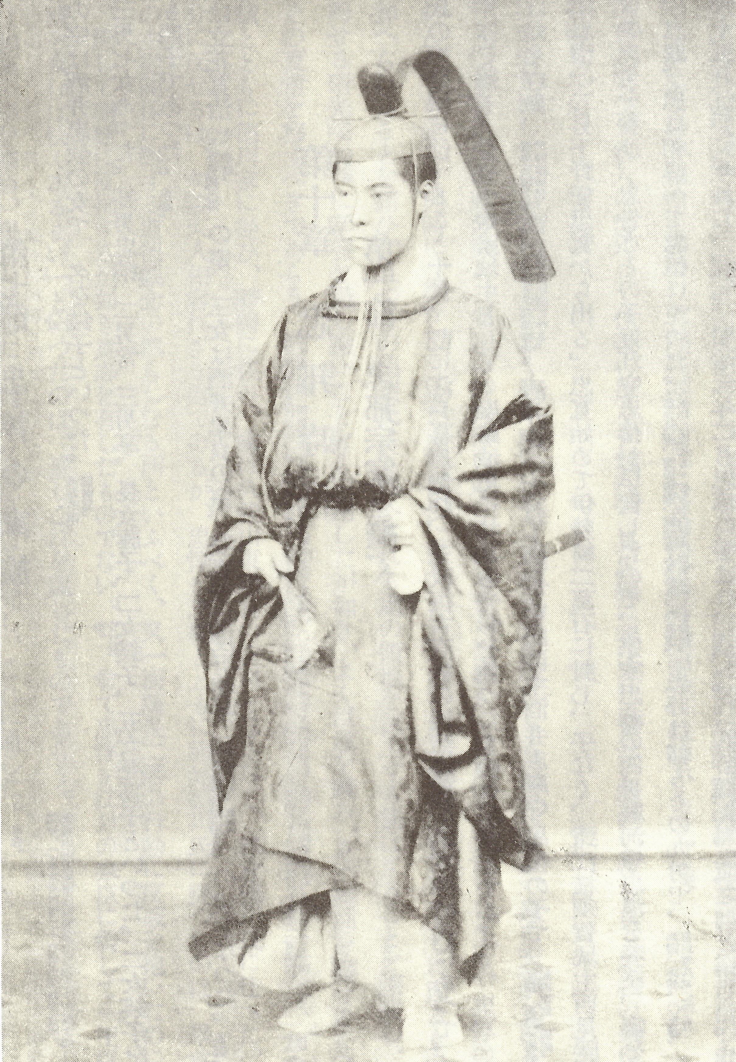 酒井忠邦の肖像写真。